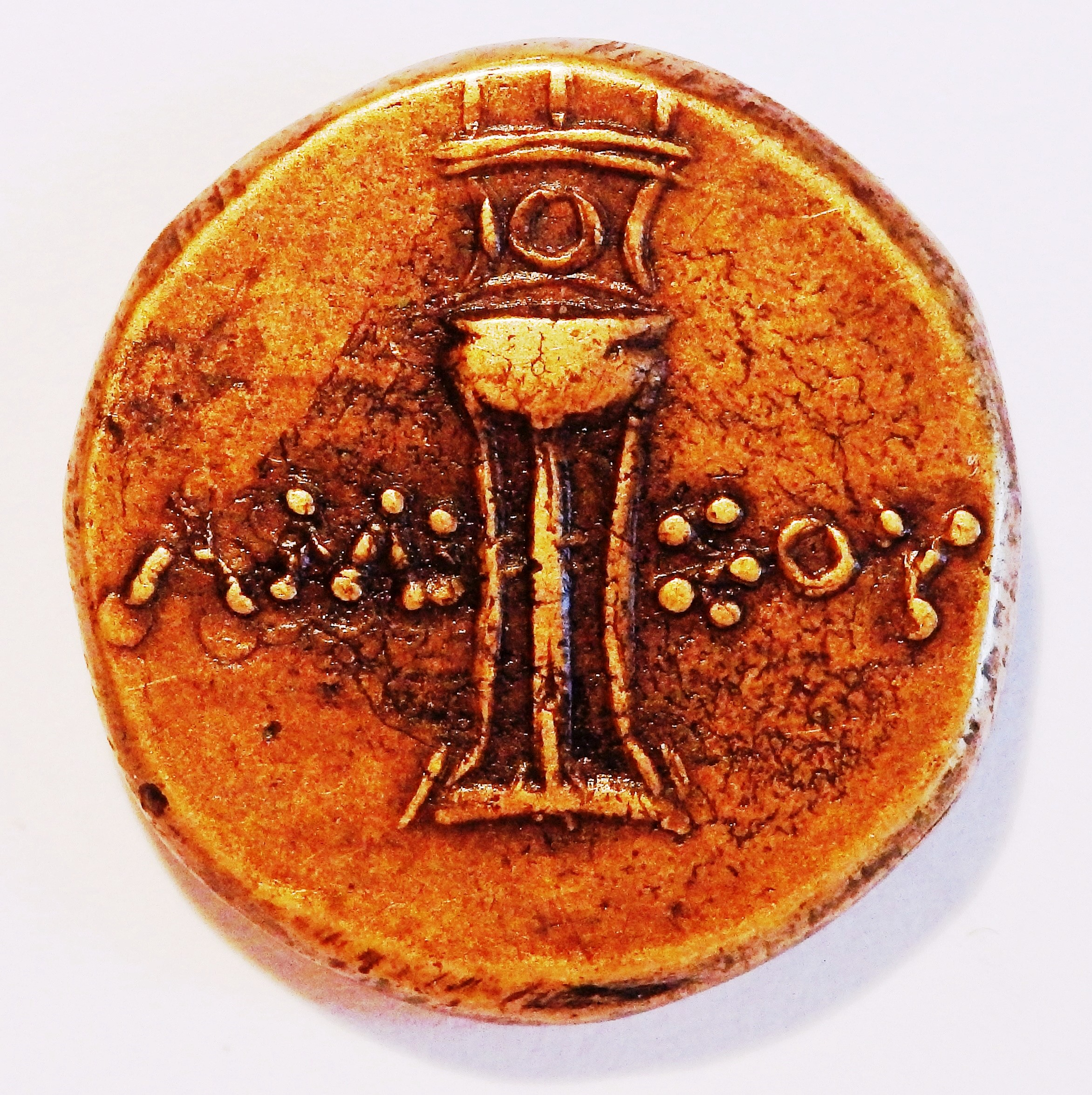 Bronzemünze aus Amisos mit Stadtnamen, dazwischen Dreifuß, ca. 120-80 v. Chr. Szaivert/Sear Nr. 3617